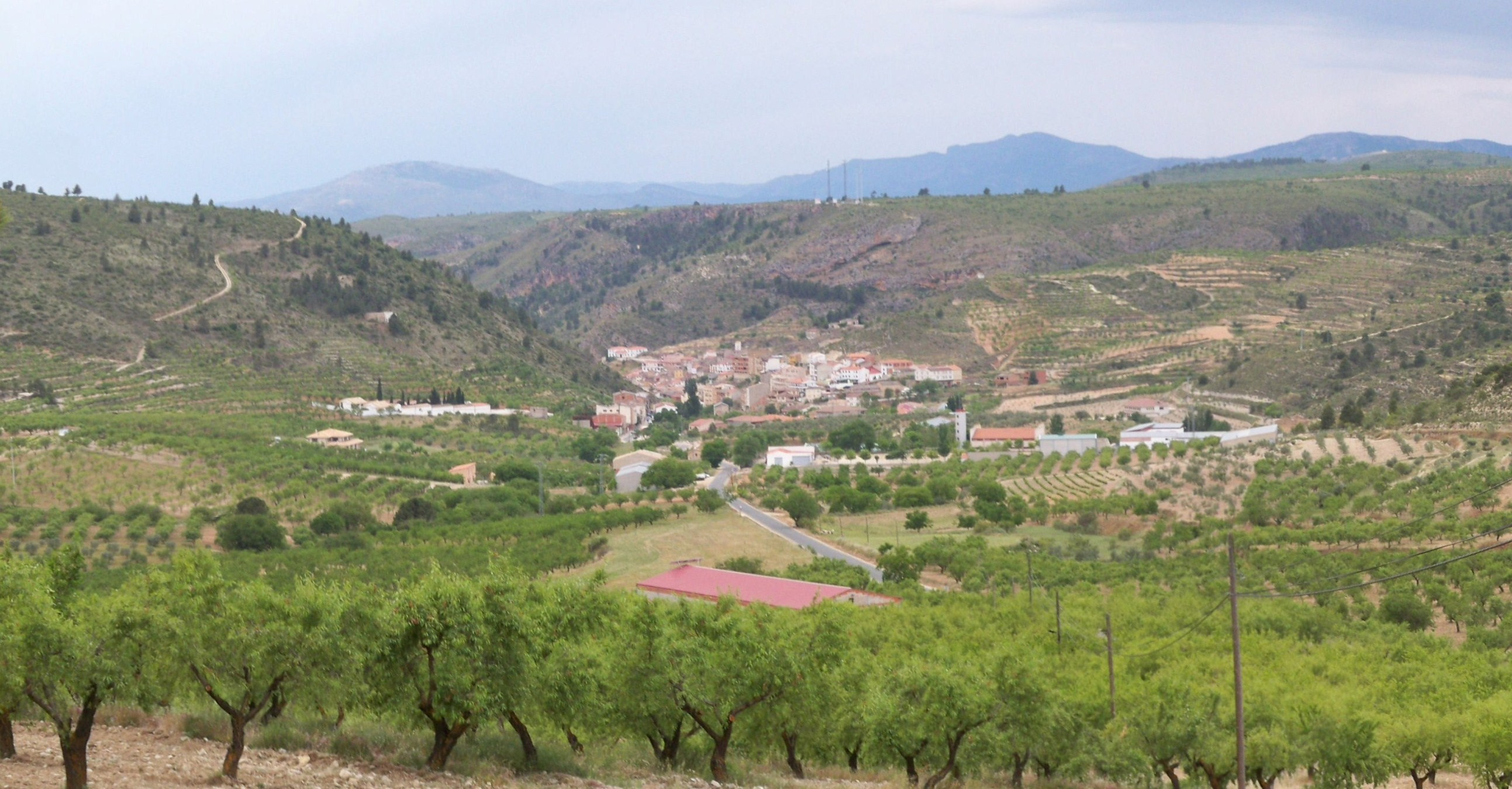 Vista del valle de Molinicos rodeado de almendros